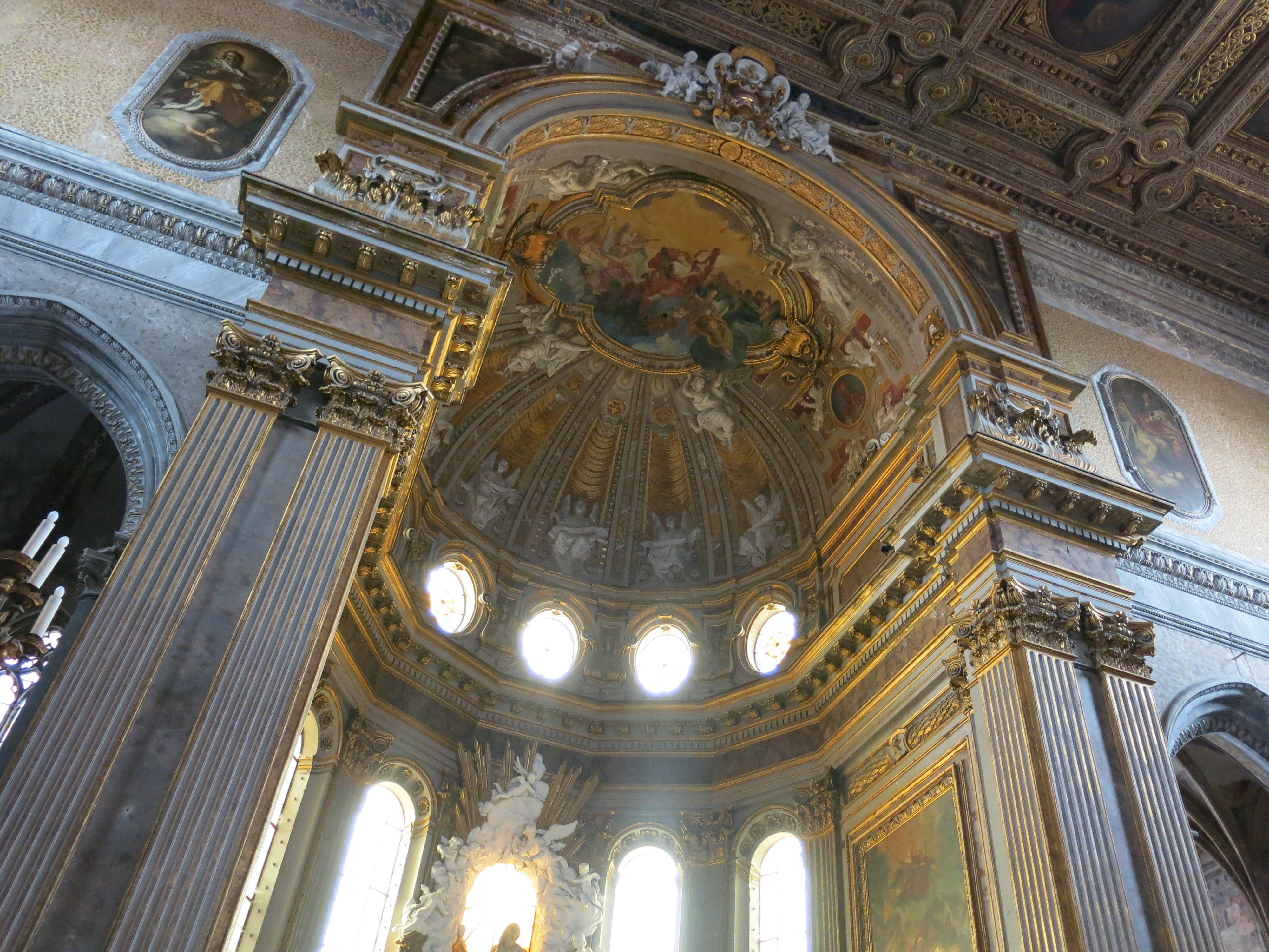 Le chiese di Napoli